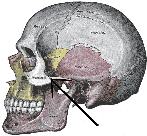 módosítva